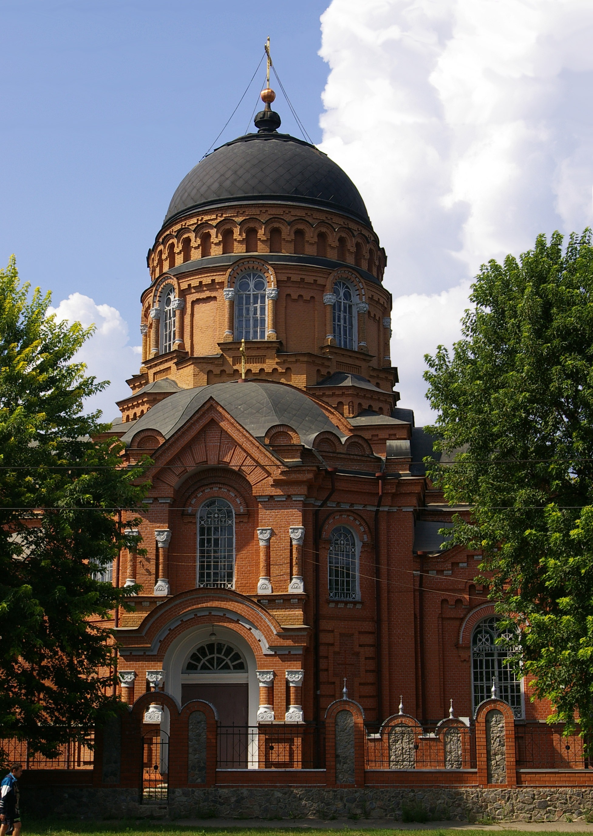 Свято-Озерянская церковь в Харькове, фасад на Полтавскую дорогу